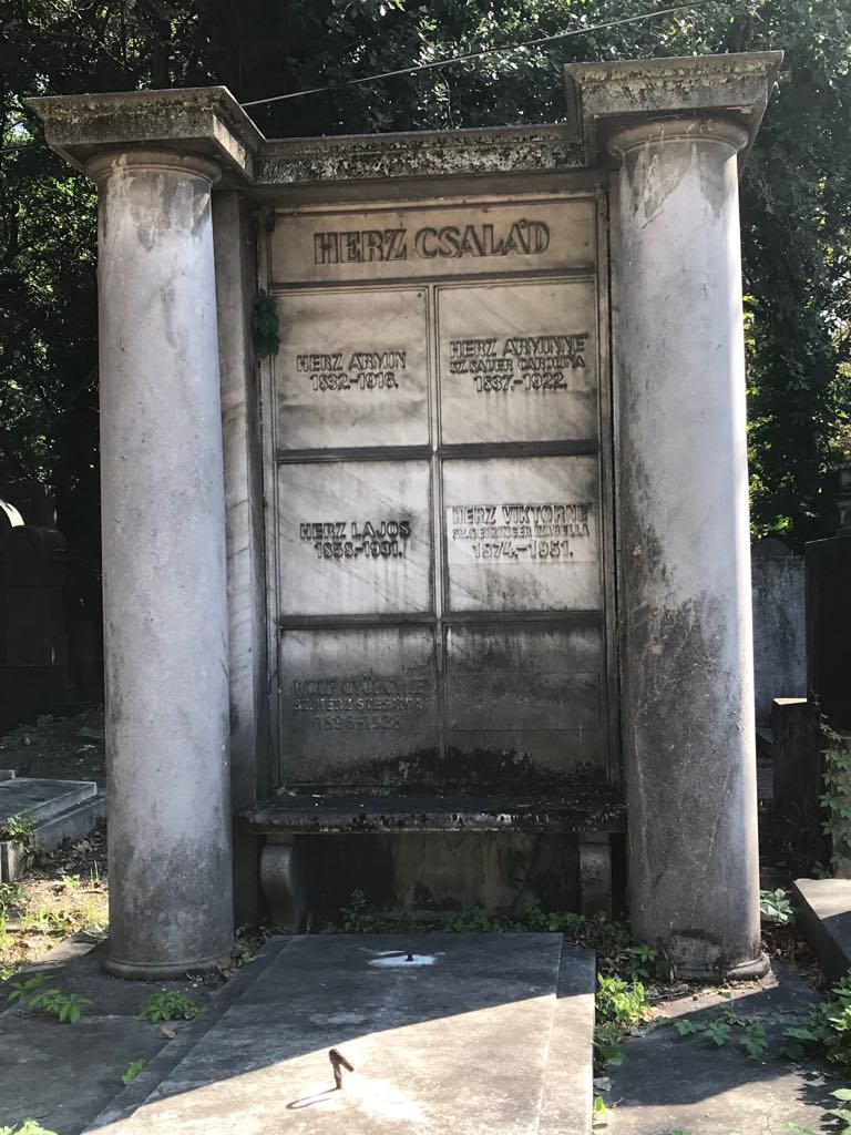 Salgótarján utcai zsidó temető. Herz család sírja.